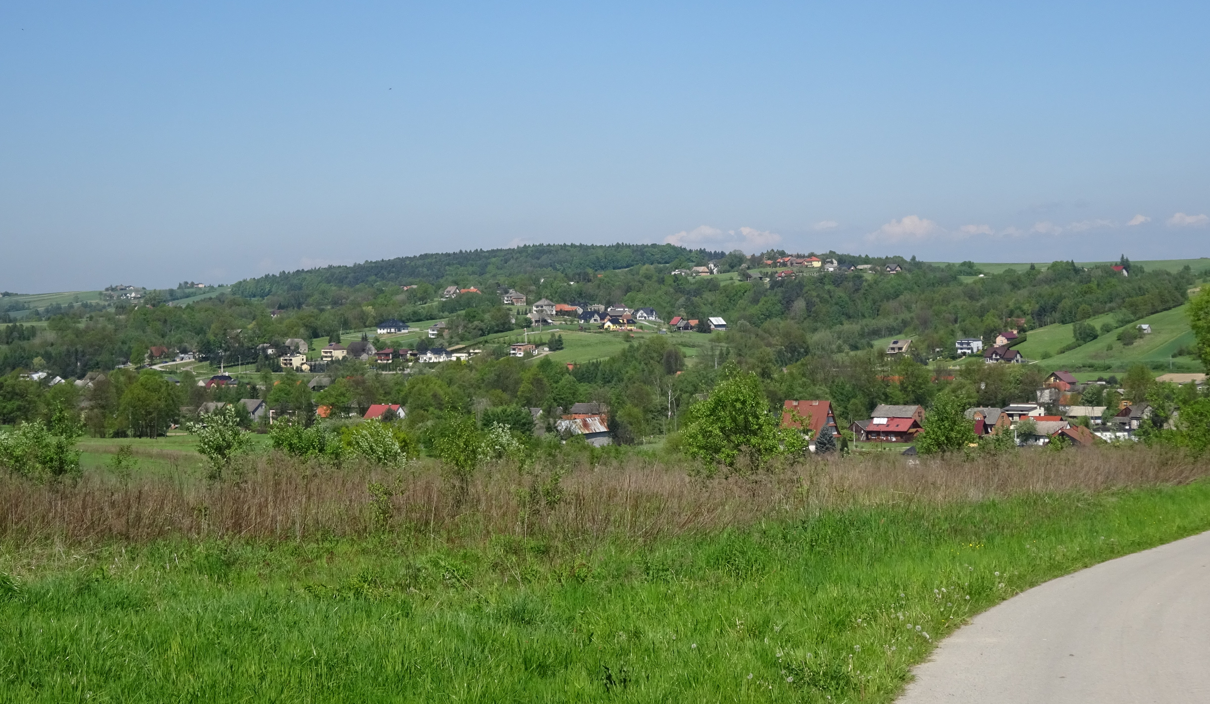 Widok na wieś Wola Radziszowska w Województwie Małopolskim, Powiecie Krakowskim, Gminie Skawina od południa. 2016